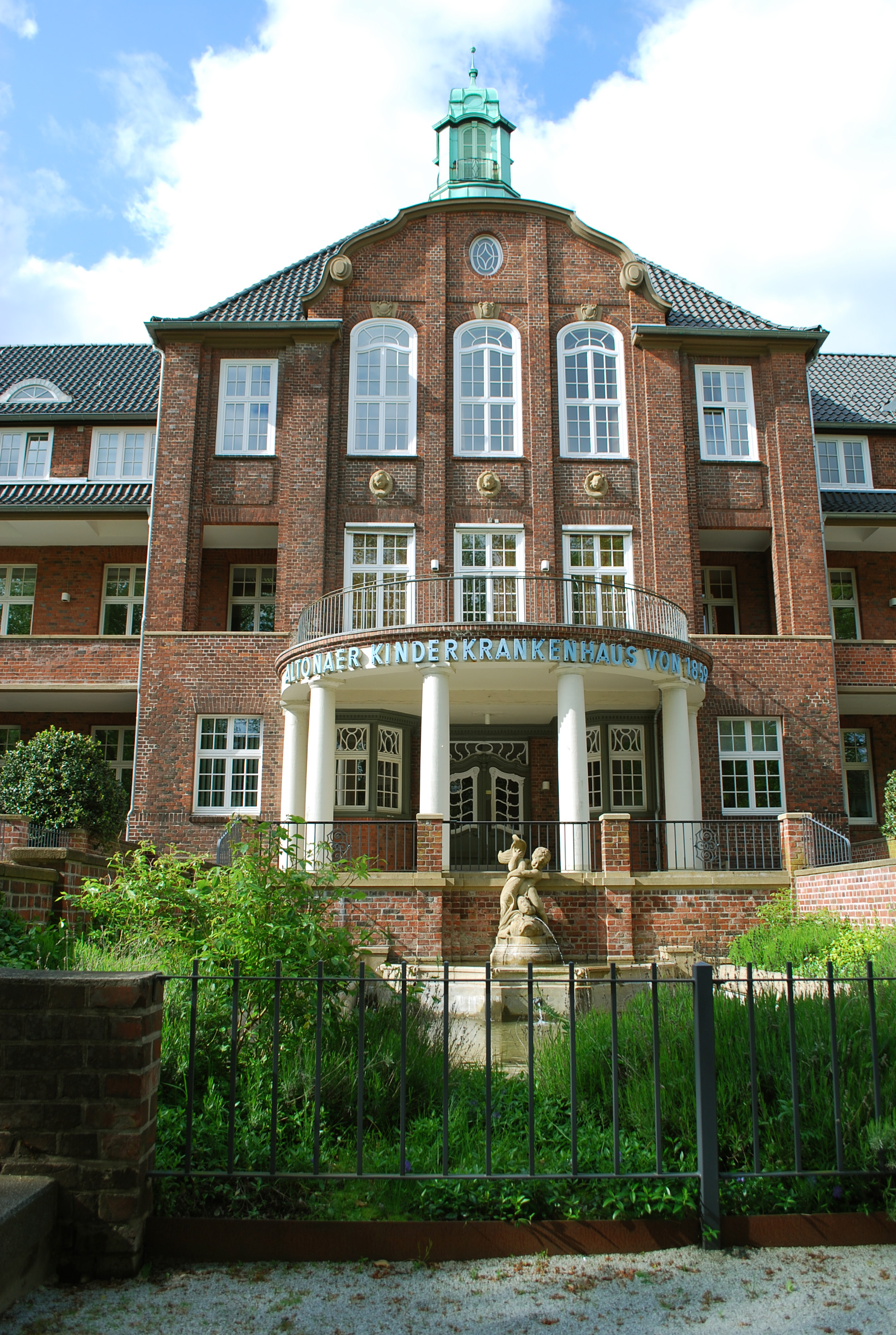 Altonaer Kinderkrankenhaus, H-Haus (früher: Haupthaus), Verwaltung Alter Haupteingang